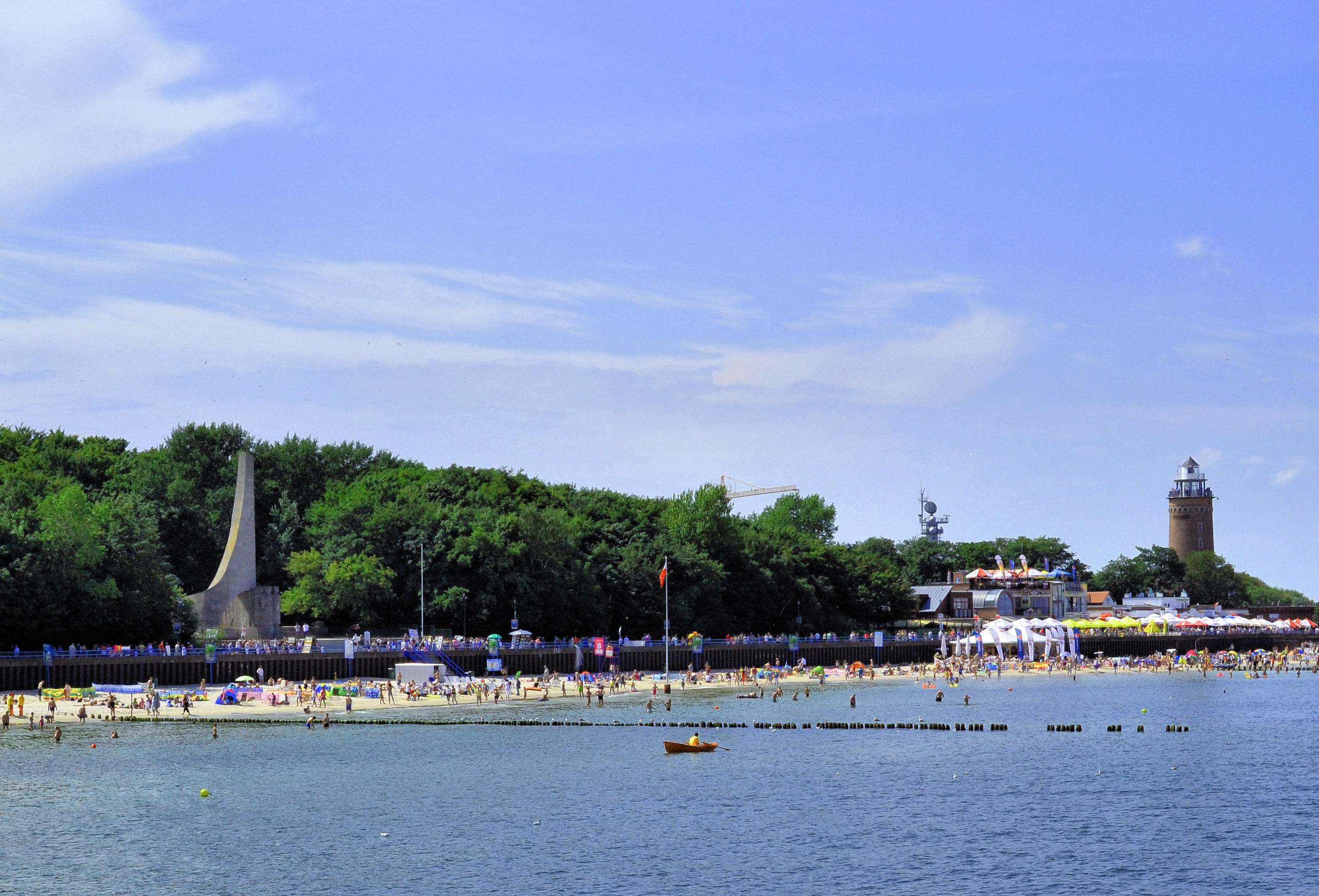 Pomnik Zaślubin Polski z Morzem i latarnia morska w Kołobrzegu